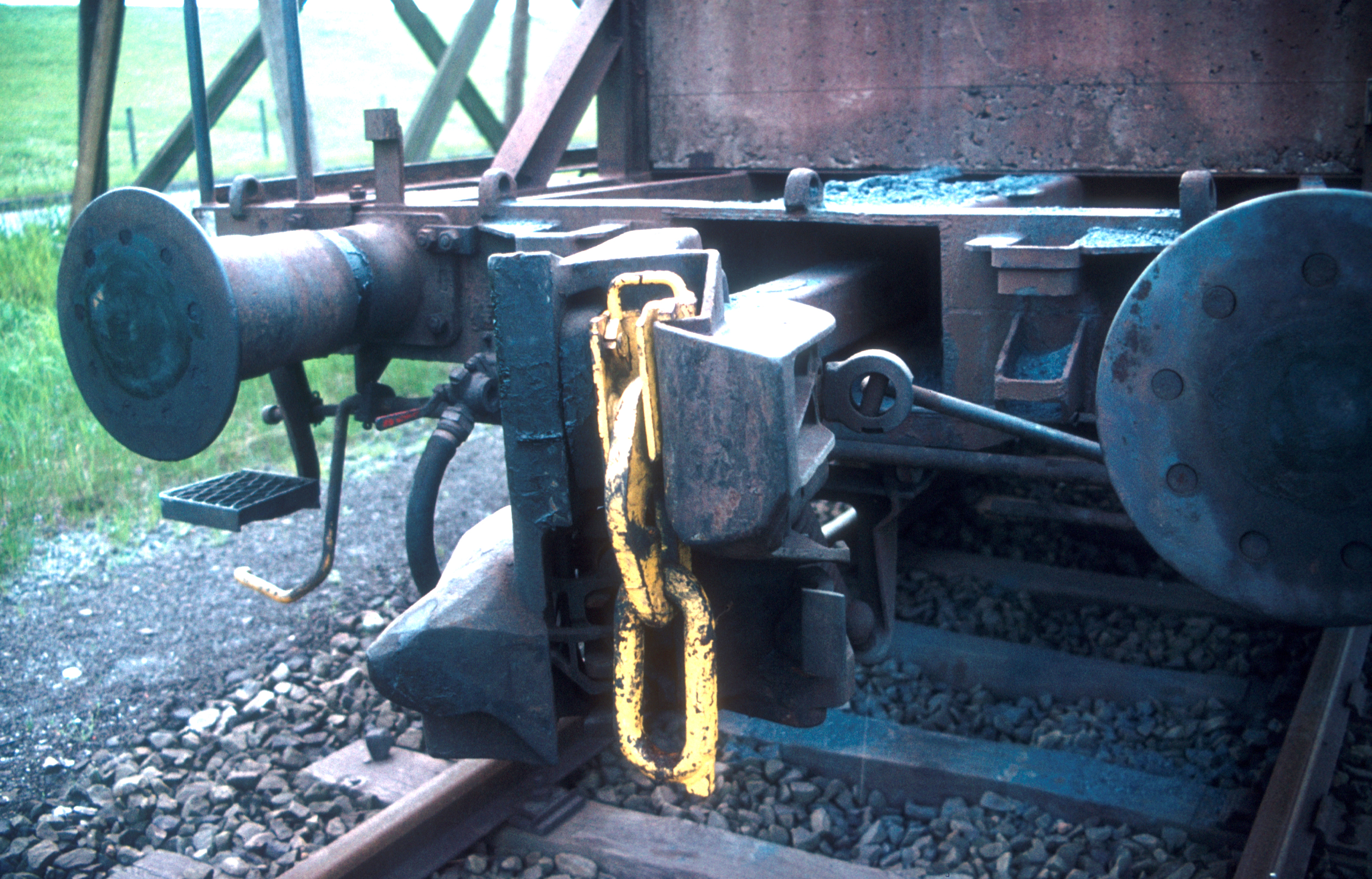 Hulpkoppeling van koppelwagen.